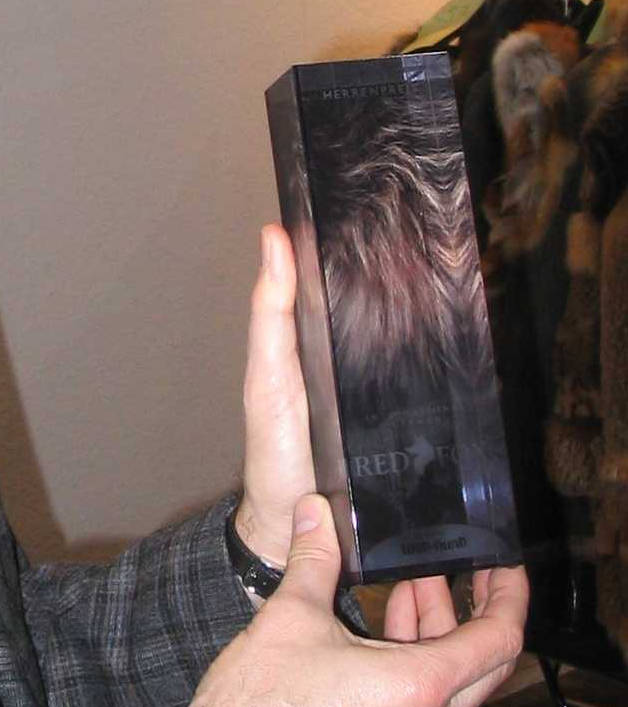 Heiko Hornung von „Wild und Hund“ mit einer der Siegertrophäen, einem gelaserten Kunststoffwürfel, am Informationsstand mit der Ausstellung der Wettbewerbsteile. „International German Red Fox Award“, ein Wettbewerb zur Förderung der Nutzung der anfallenden einheimischen Felle, insbesondere der Rotfuchsfelle. Teilnahmeberechtigt waren die Mitglieder des Zentralverbands des deutschen Kürschnerhandwerks und die Kürschner Österreichs, der Schweiz und der Niederlande. Sponsoring u. a. durch die Zeitschrift „Wild und Hund“ und Messe „Jagd und Hund“. Anlässlich und auf der Messe „Jagd und Hund“, Dortmund Westfalenhallen, 29. Januar bis 3. Februar 2013.